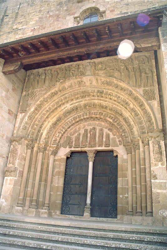 Pórtico del Monasterio de Leyre en Yesa en la provincia de Navarra, (España).